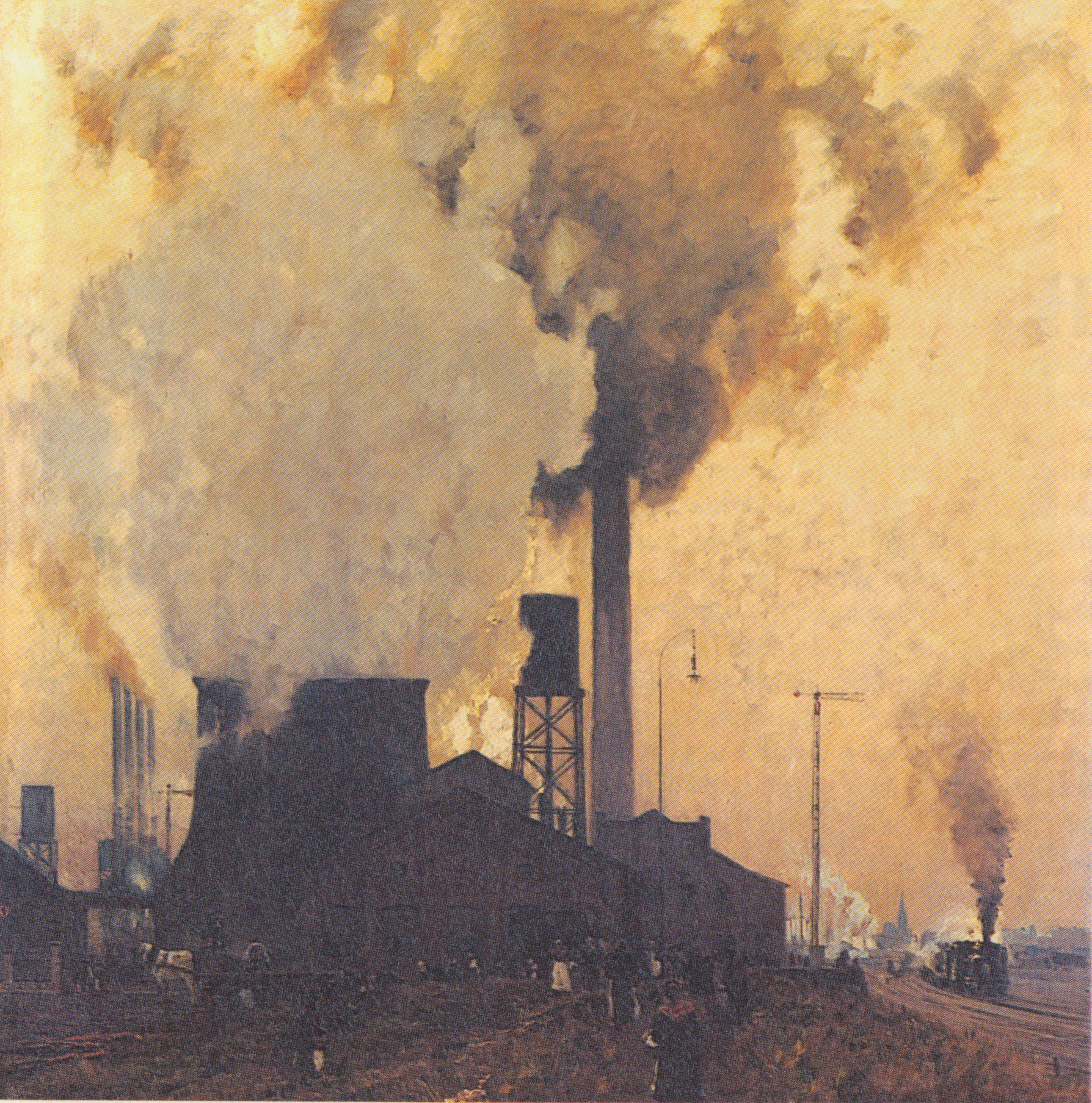 Eisen- und Stahlwerk Hoesch, Dortmund 1907 Öl auf Leinwand 137x136 cm